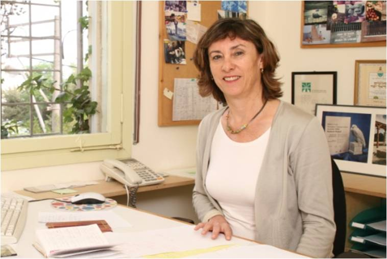 דפנה גרינשטיין